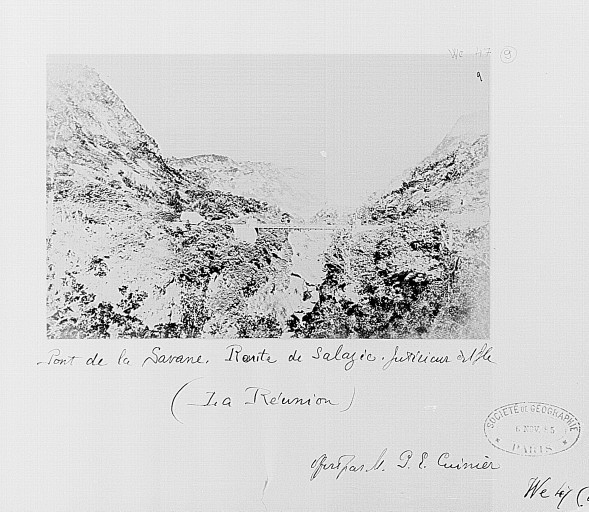 Le pont de la Savane et la route de Salazie avant 1885.